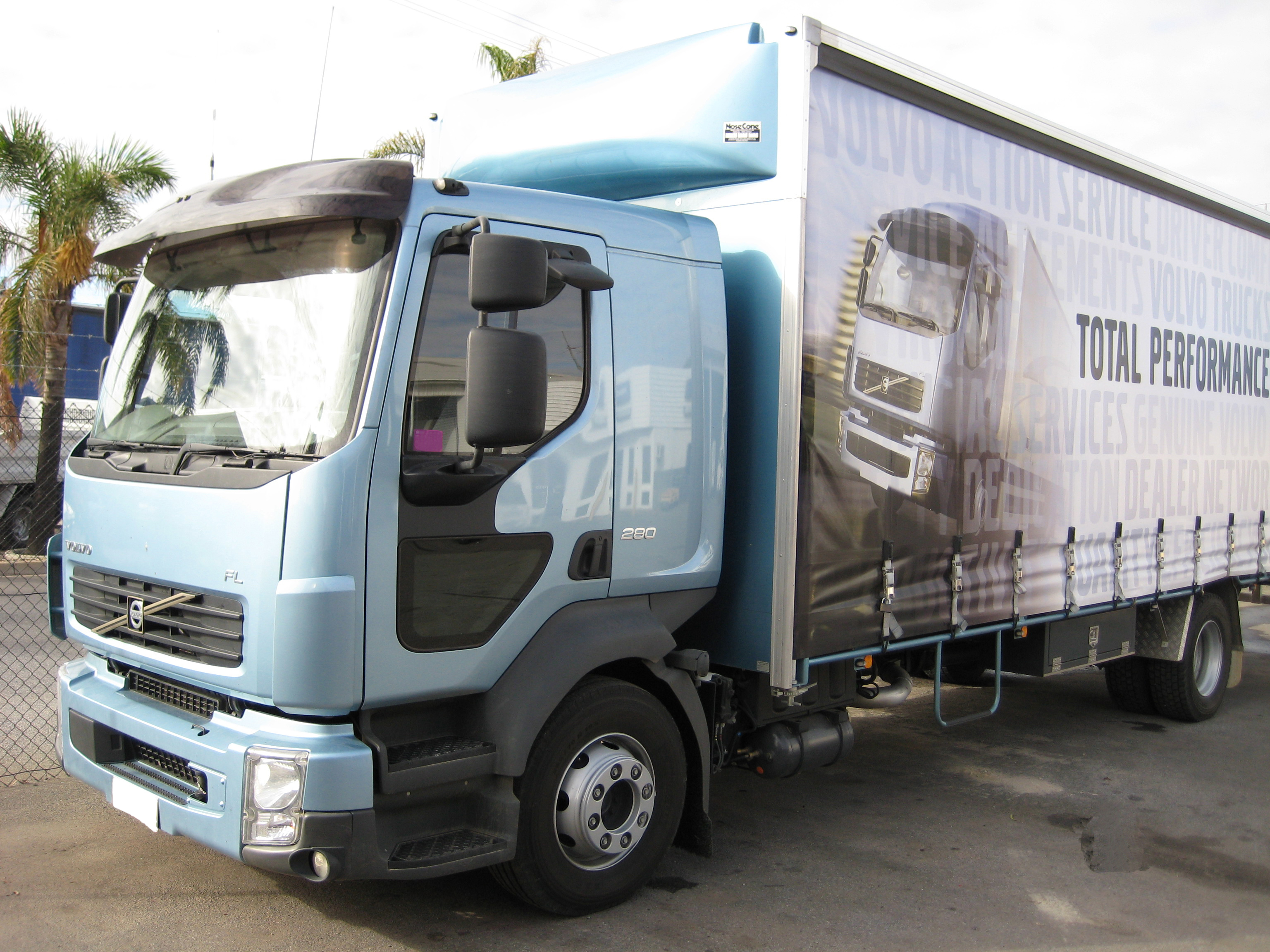 Volvo FL 4x2